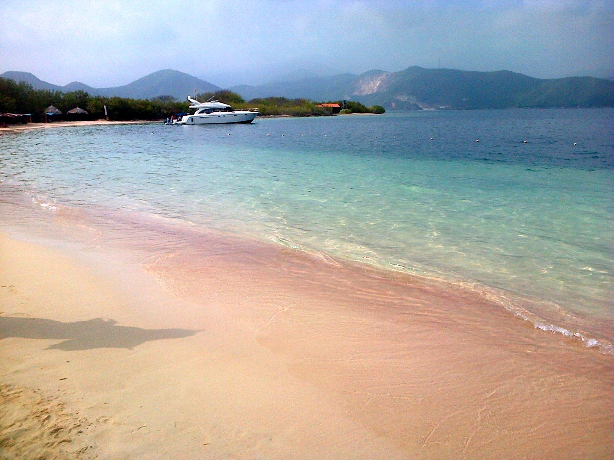 Isla Larga Estado Carabobo al amanecer.